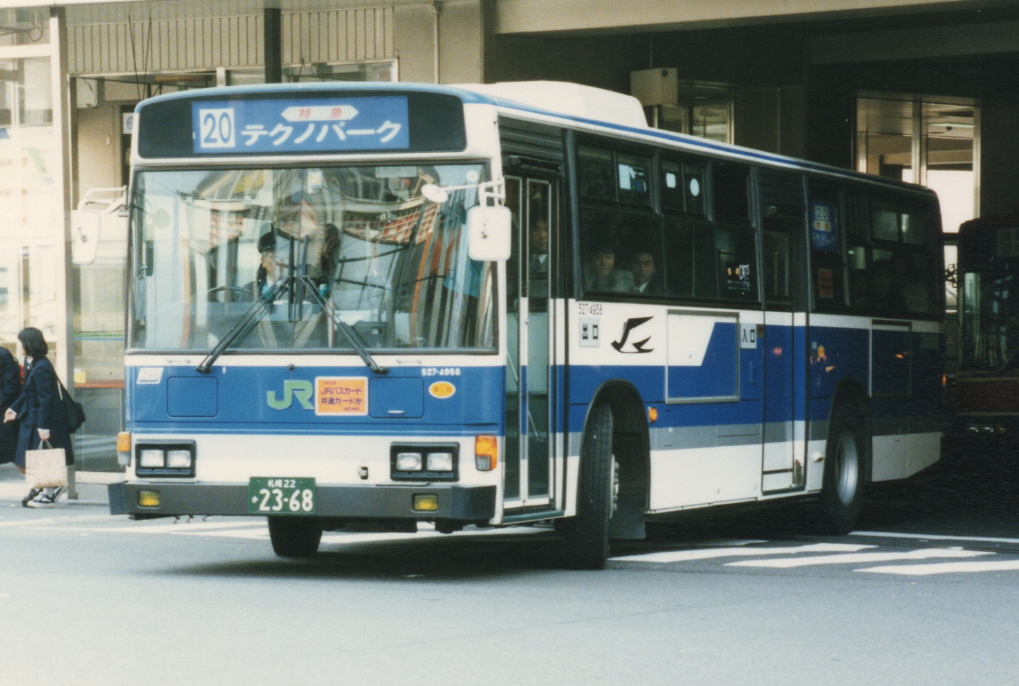 特急20番時代 新札幌ターミナルにて